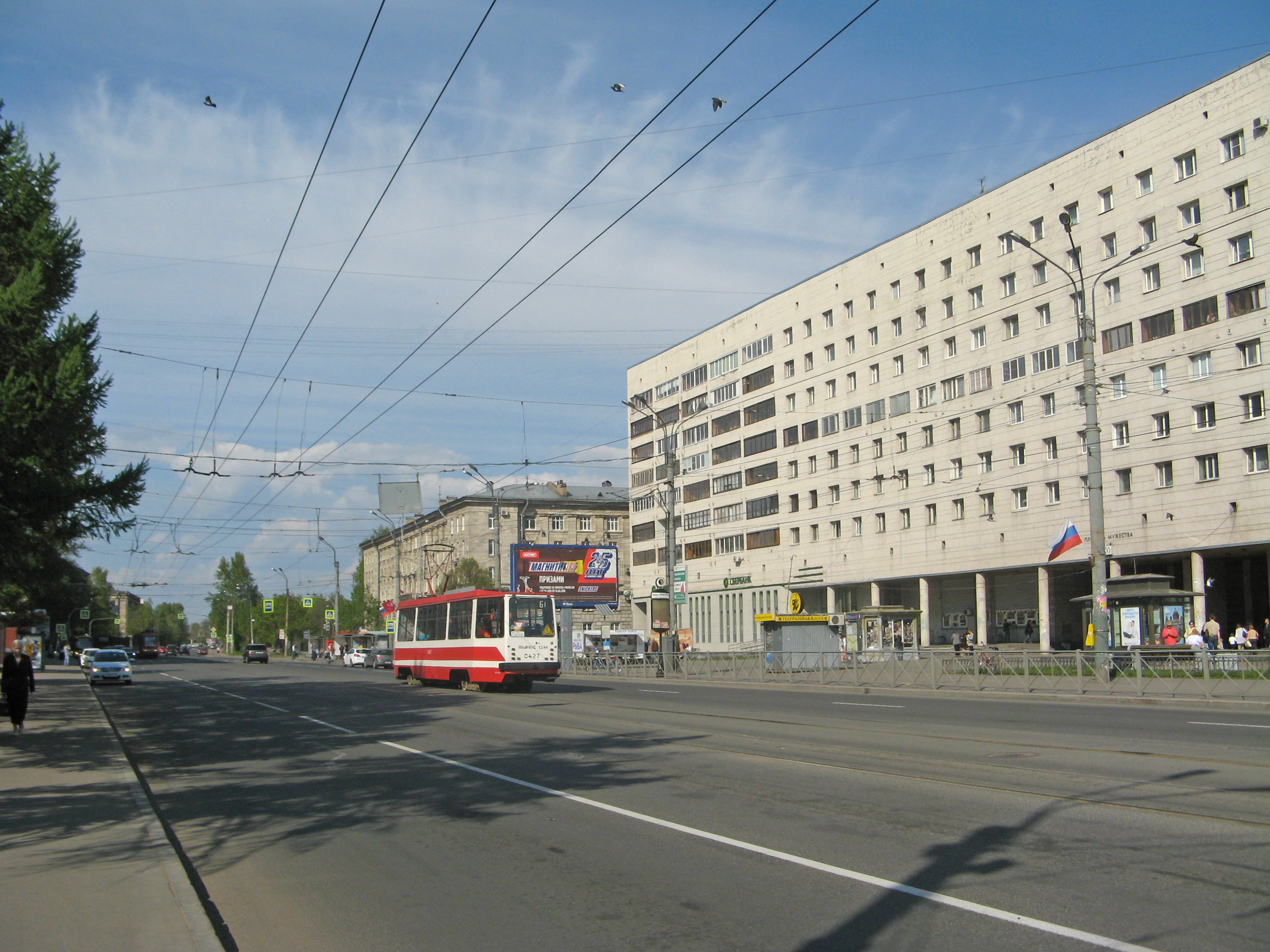 Политехническая улица, Санкт-Петербург